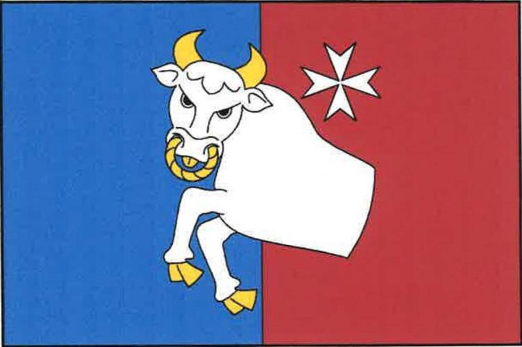 Blažim (PS), vlajka. List tvoří dva svislé pruhy, modrý a červený. Uprostřed čelně hledící polovina bílého zubra ve skoku se žlutou zbrojí, jazykem a houžví, provázená nad hřbetem bílým maltézským křížem. Poměr šířky k délce listu je 2 : 3.